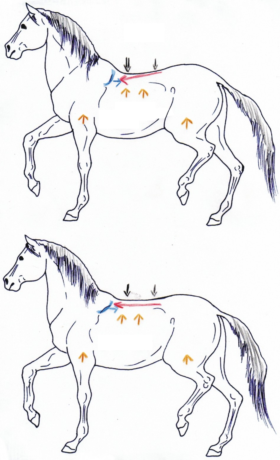 Sattlungsrelevante Schubkräfte des Pferdes